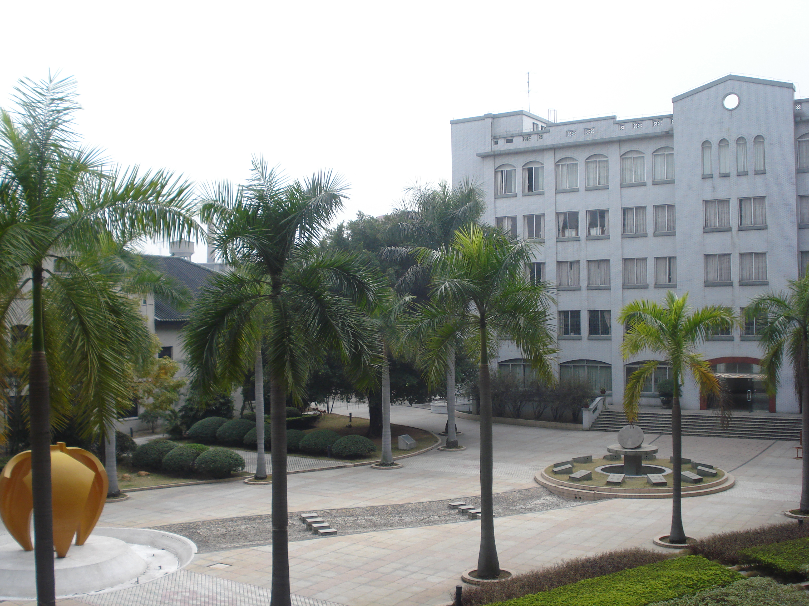 佛山一中新旧图书馆